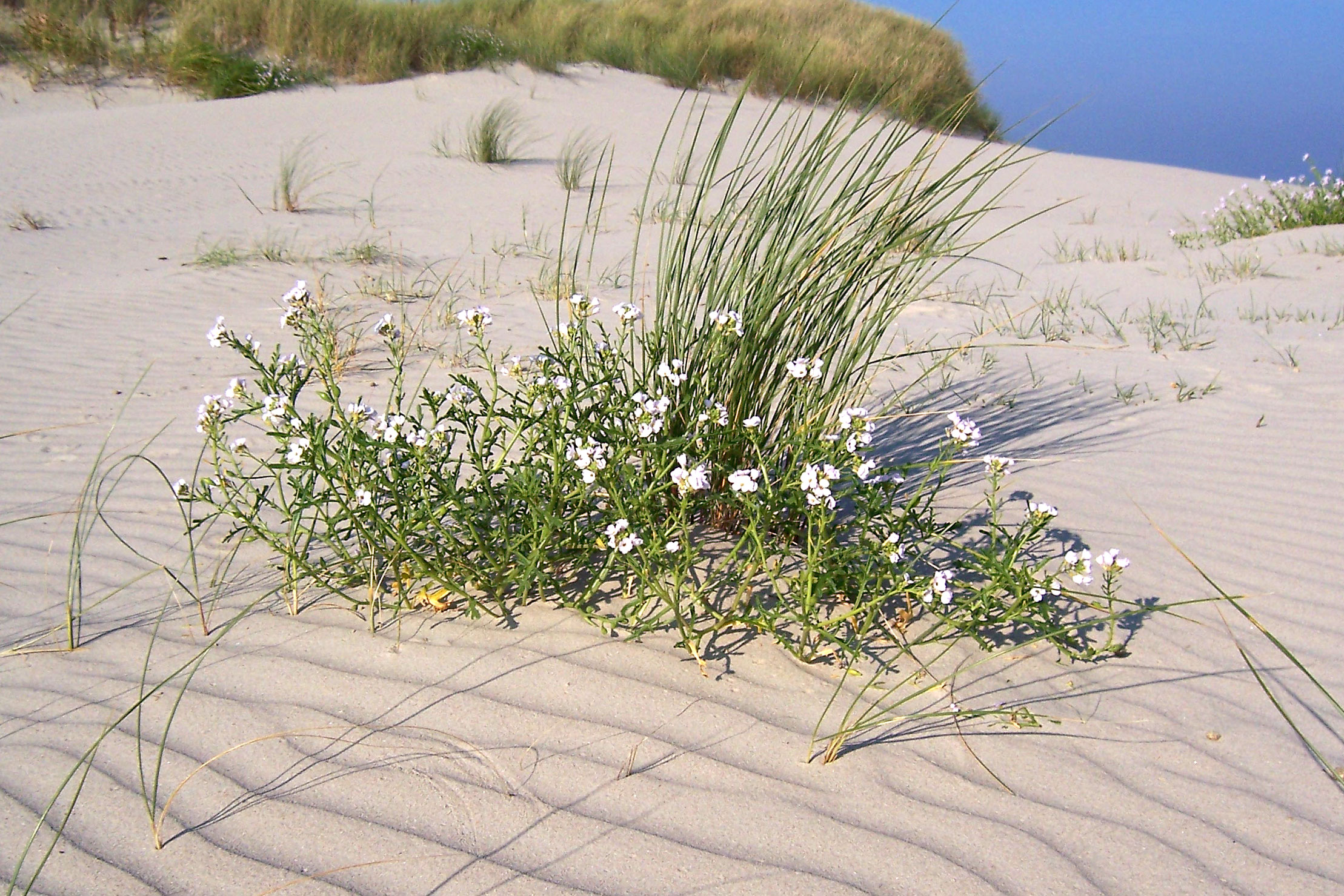 Nordseeinsel Spiekeroog: Europäischer Meersenf (Cakile maritima) und Strandhafer (Ammophila arenaria)